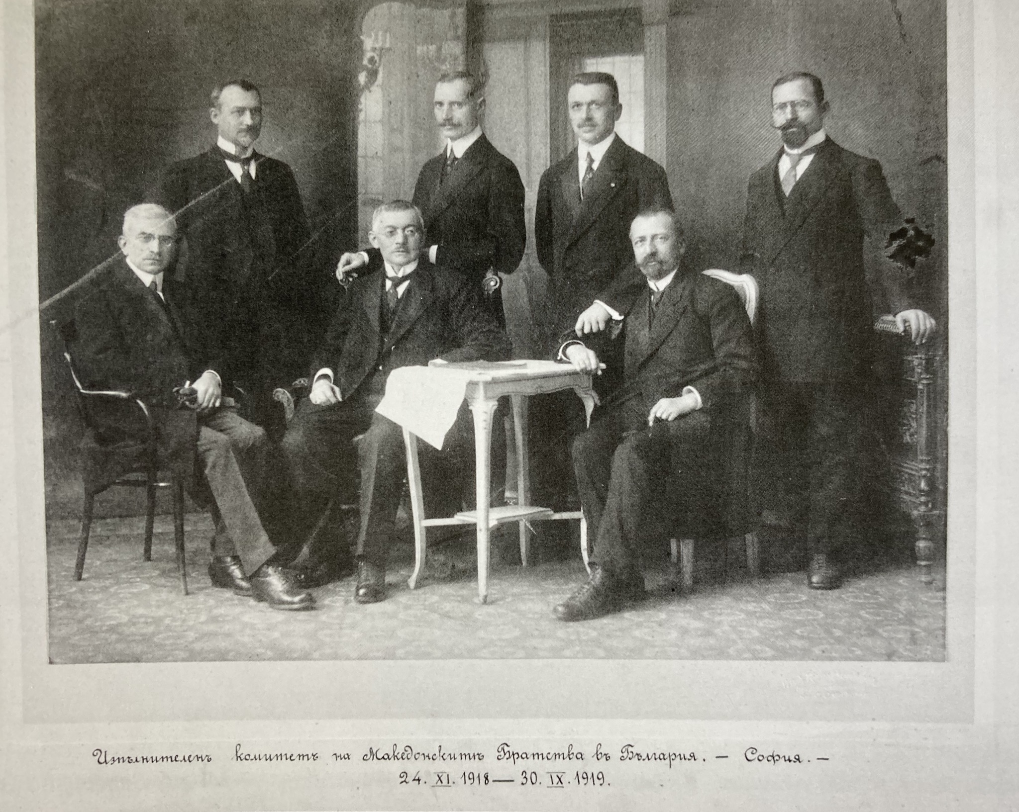 Изпълнителният комитет на Македонските братства в България